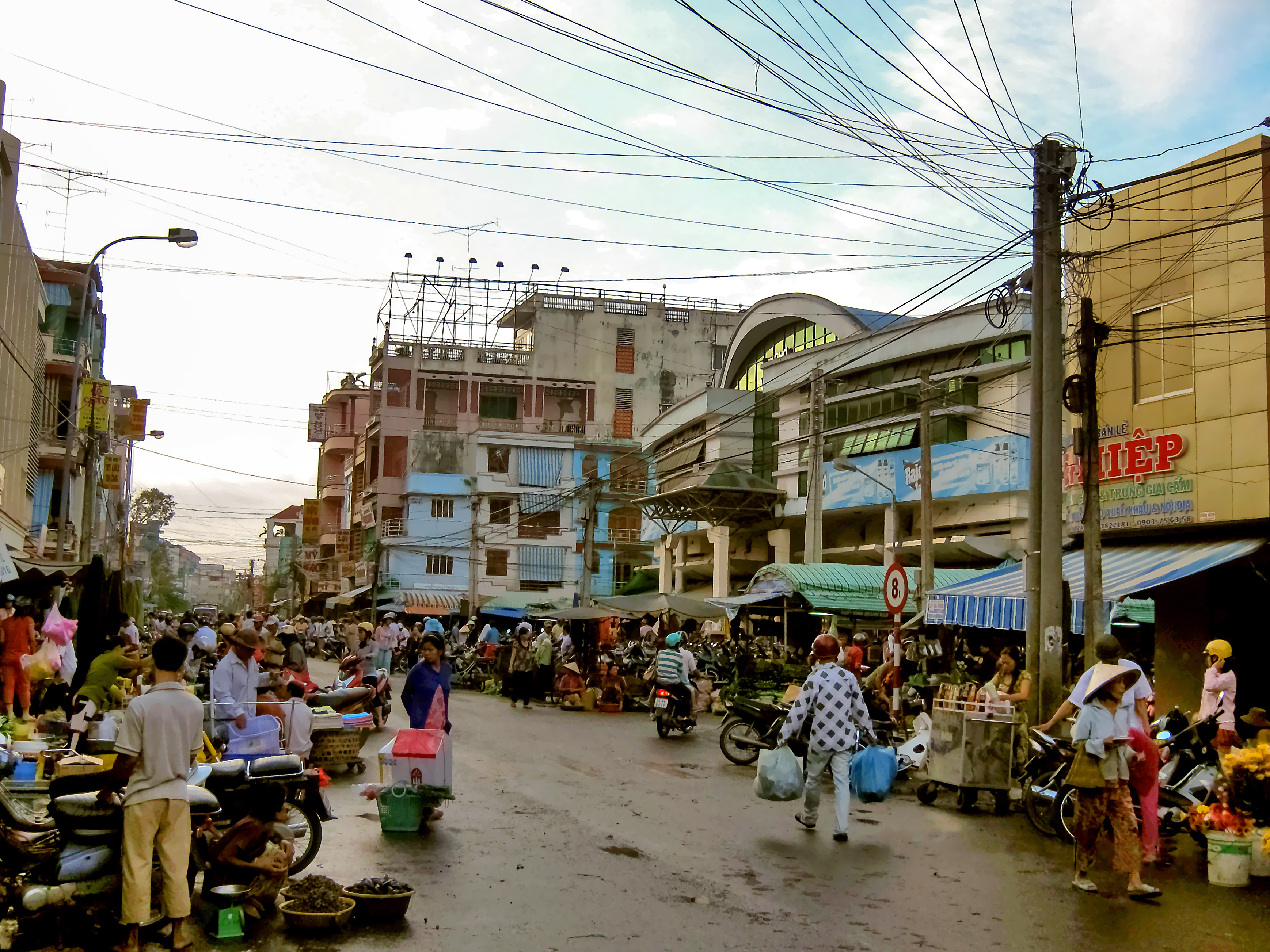 Chợ Vĩnh Long (mặt nằm trên đường 1 tháng 5), thuộc phường 1, TP. Vĩnh Long (Việt Nam).